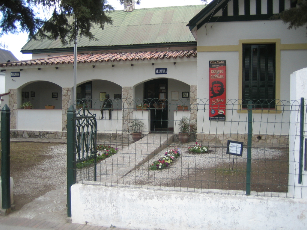 Casa Museo del Che en Alta Gracia - Córdoba - Argentina